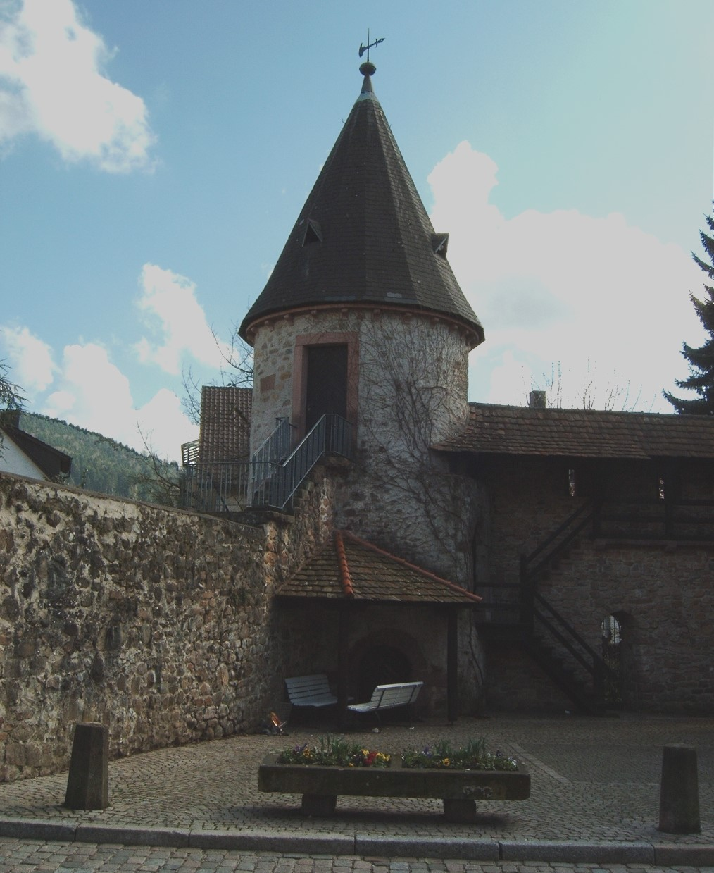 Zell am Harmersbach: Hirschturm